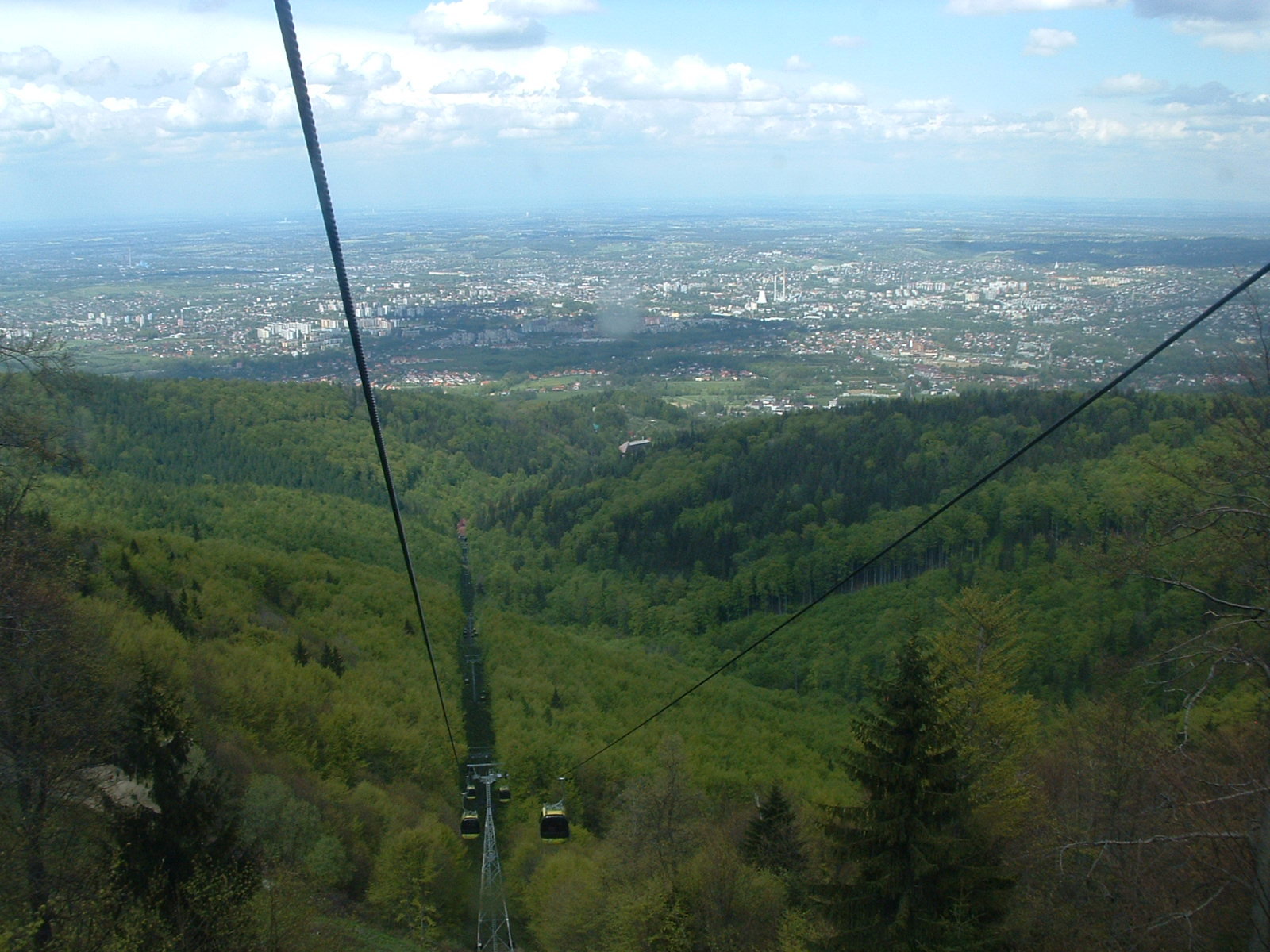 Widok na Bielsko-Białą z kolejki na Szyndzielnię